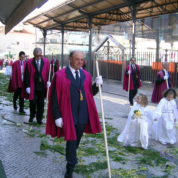 Osterprozession in Aveiro (Ostern 2004) im Hintergrund der Mercado de Peixe (geschlossen wegen Modernisierungsarbeiten, inzwischen eröffnet) (das Bild ist selbst fotografiert und in dieser Auflösung von mir unter der GNU-FDL freigegeben) Fotografiert von Janekpfeifer am 11.April 2004